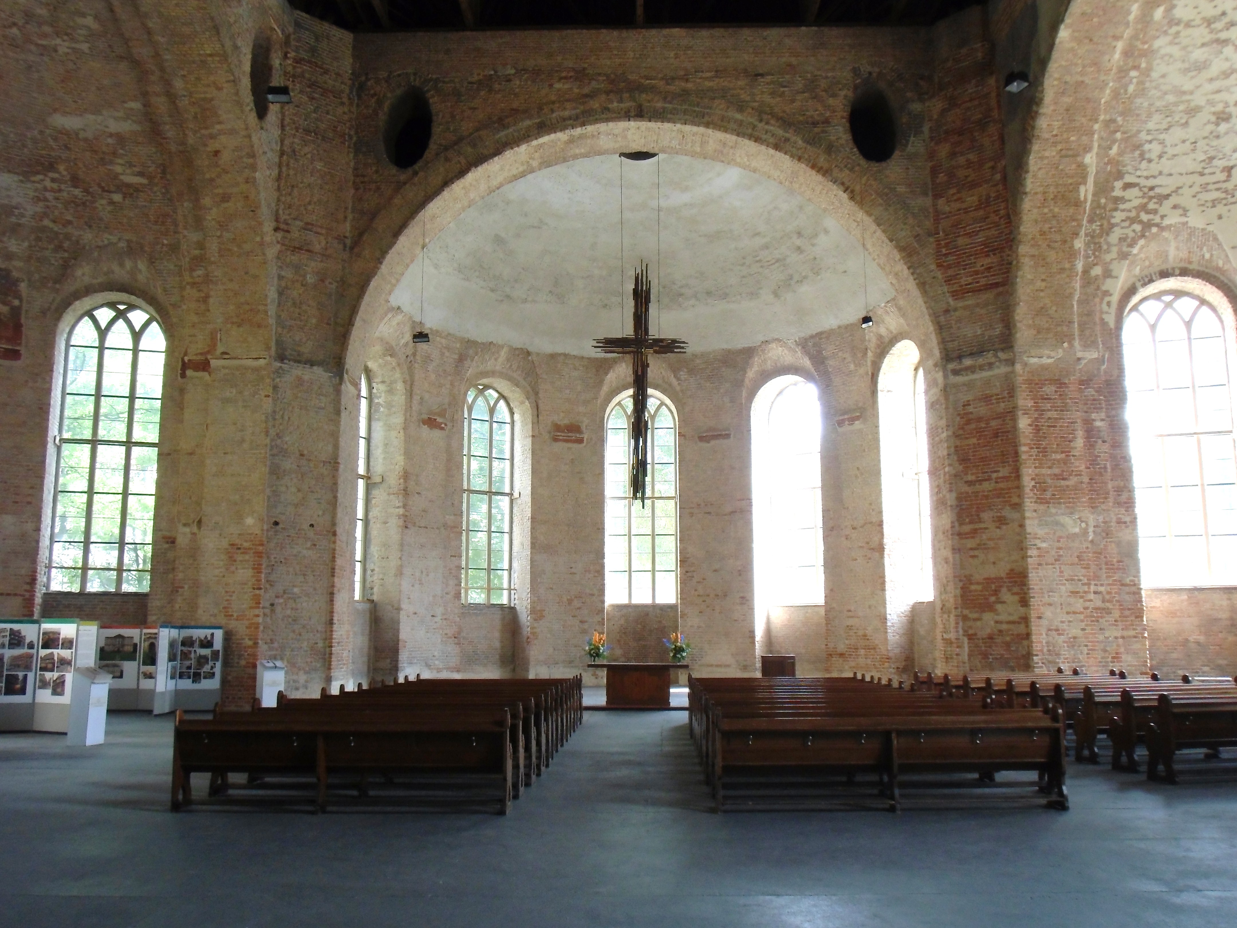 Innenraum der denkmalgeschützten Parochialkirche in der Klosterstraße, 1703 nach Plänen von Johann Arnold Nering eingeweiht